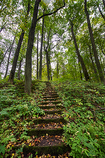 Ilzenbergo dvaro parko fragmentas. Prieš 2012 metų rekonstrukciją.